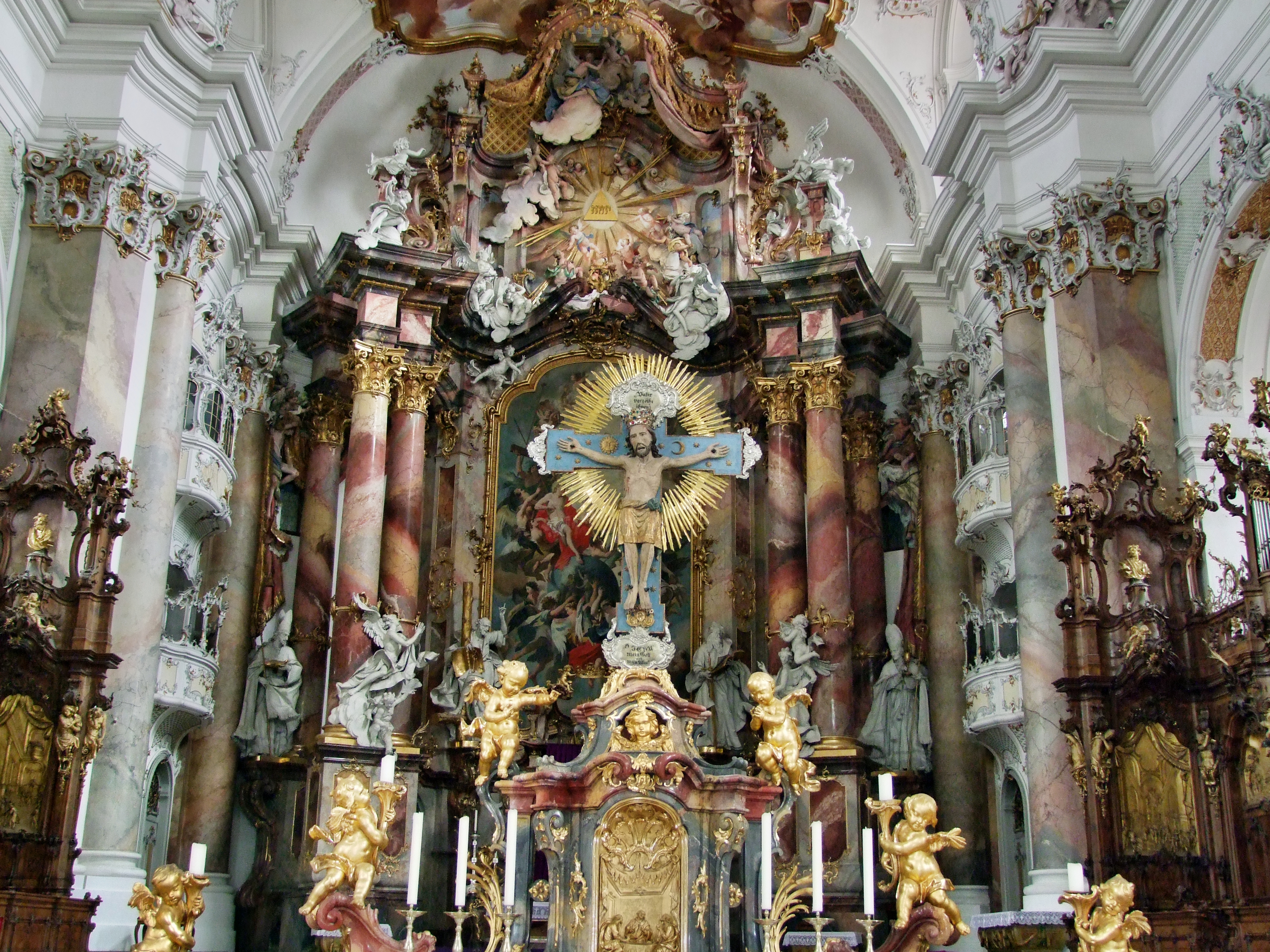 Kreuzaltar mit romanischen Kruzifix und Hochaltar im Hintergrund (F14), Basilika Ottobeuren